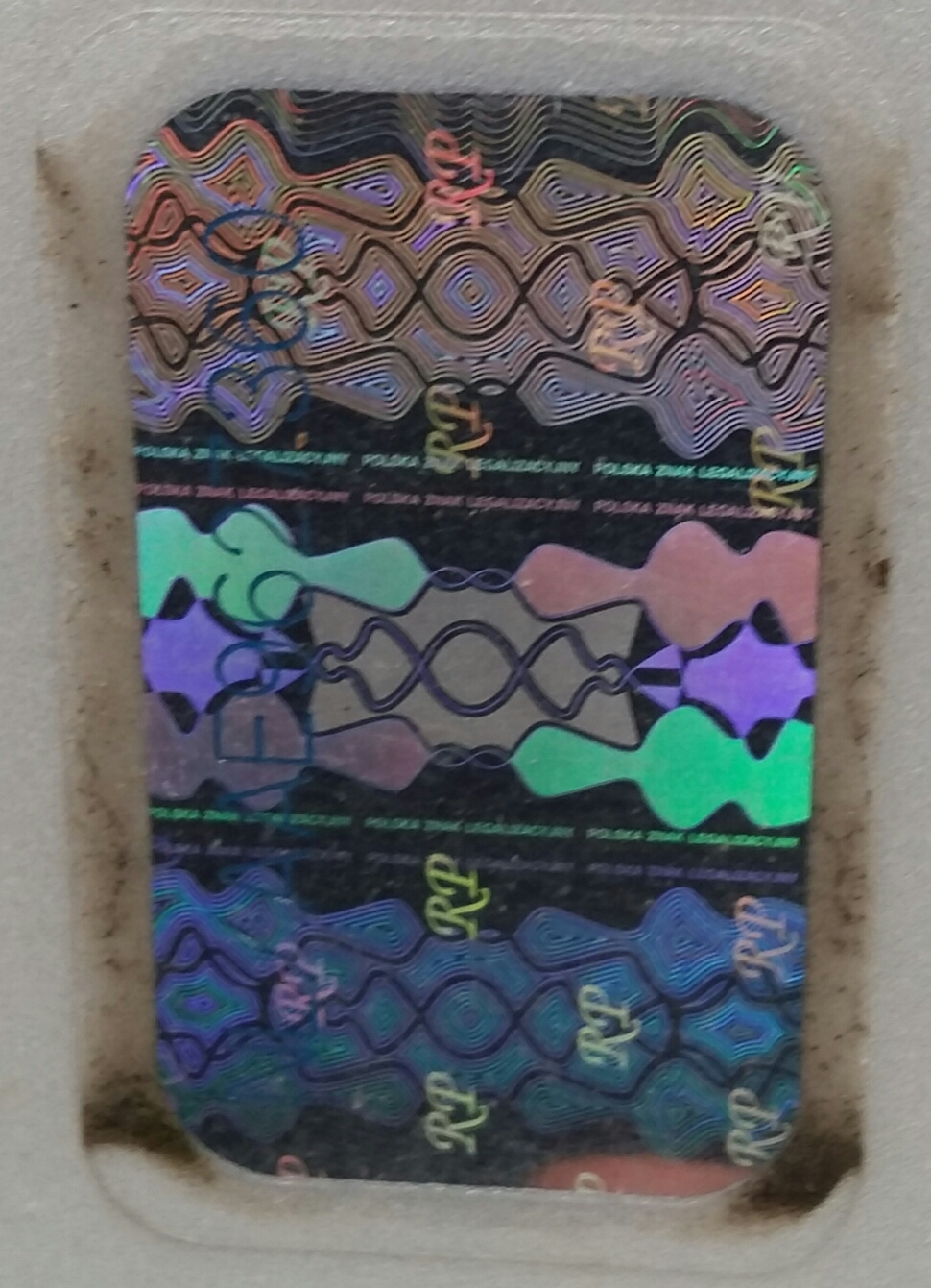 Nalepka legalizacyjna na polskiej tablicy rejestracyjnej.